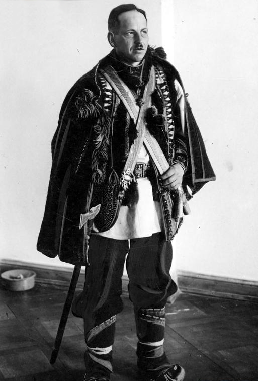 Petro Szekeryk-Donikyw